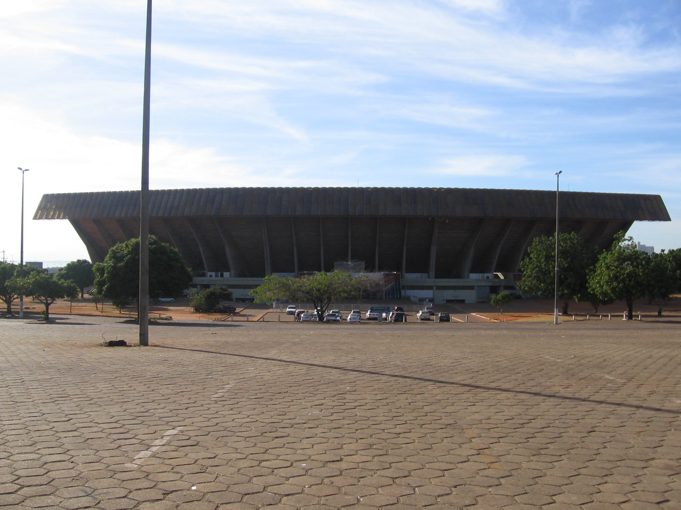 Mané Garrincha Stadium